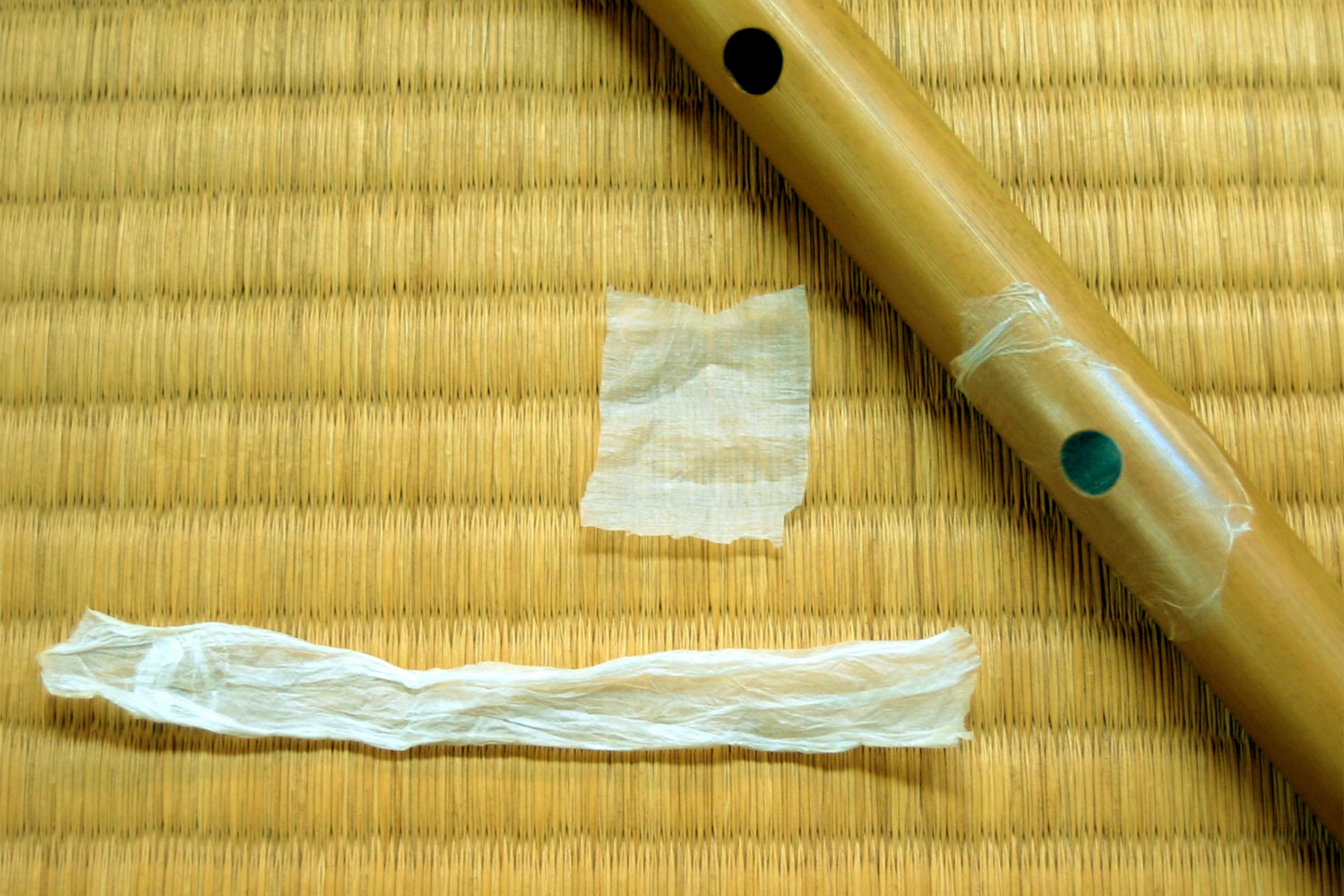 Chikushi（竹紙） and Fue（笛）.